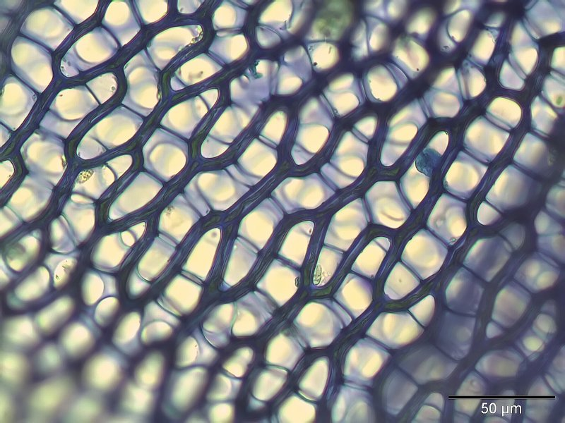 Sphagnum fimbriatum, Astblatt-Zellen, 400x